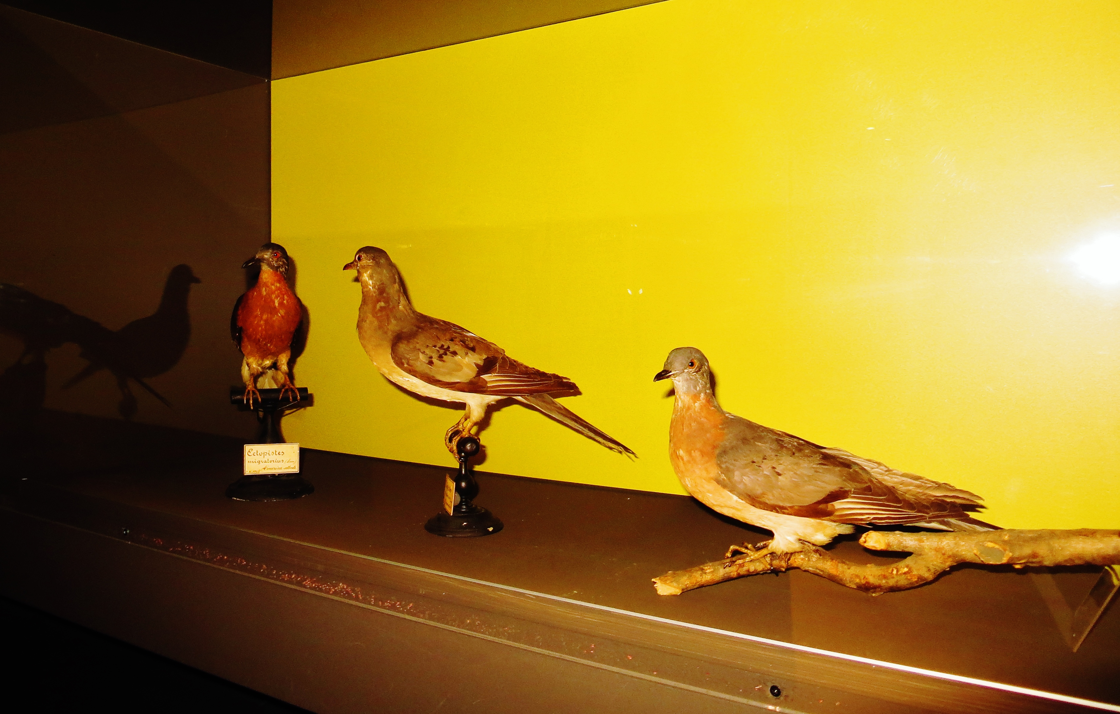 Ectopistes migratorius - Took the picture at MUSE, Trento